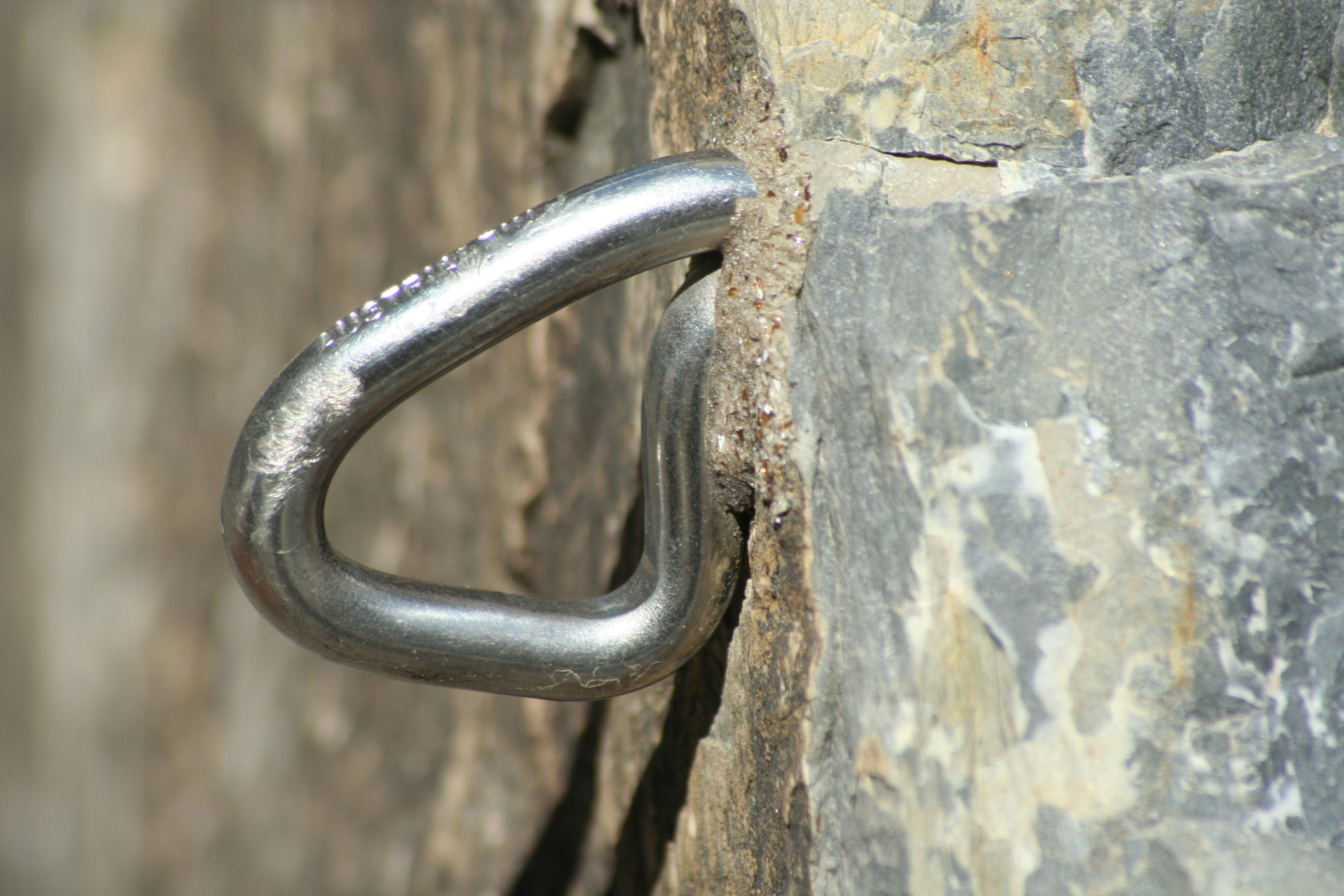 Bühlerhaken